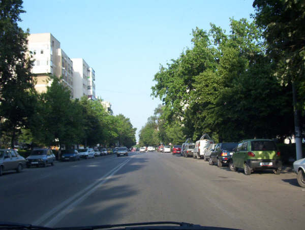 Bulevardul Matei Basarab din Slobozia, România.